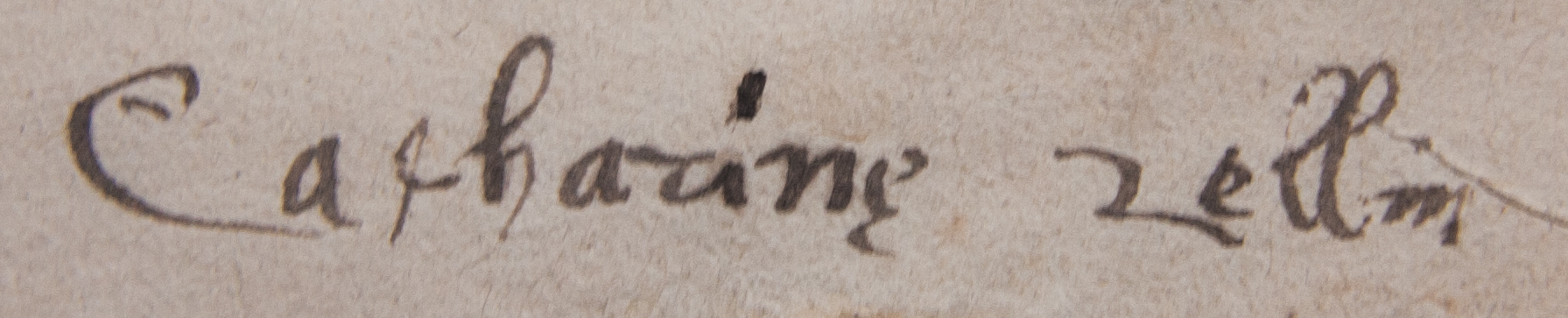 Ex libris de Catherine Zell dans un ouvrage de Martin Bucer. Coll. Médiathèque protestante de Strasbourg